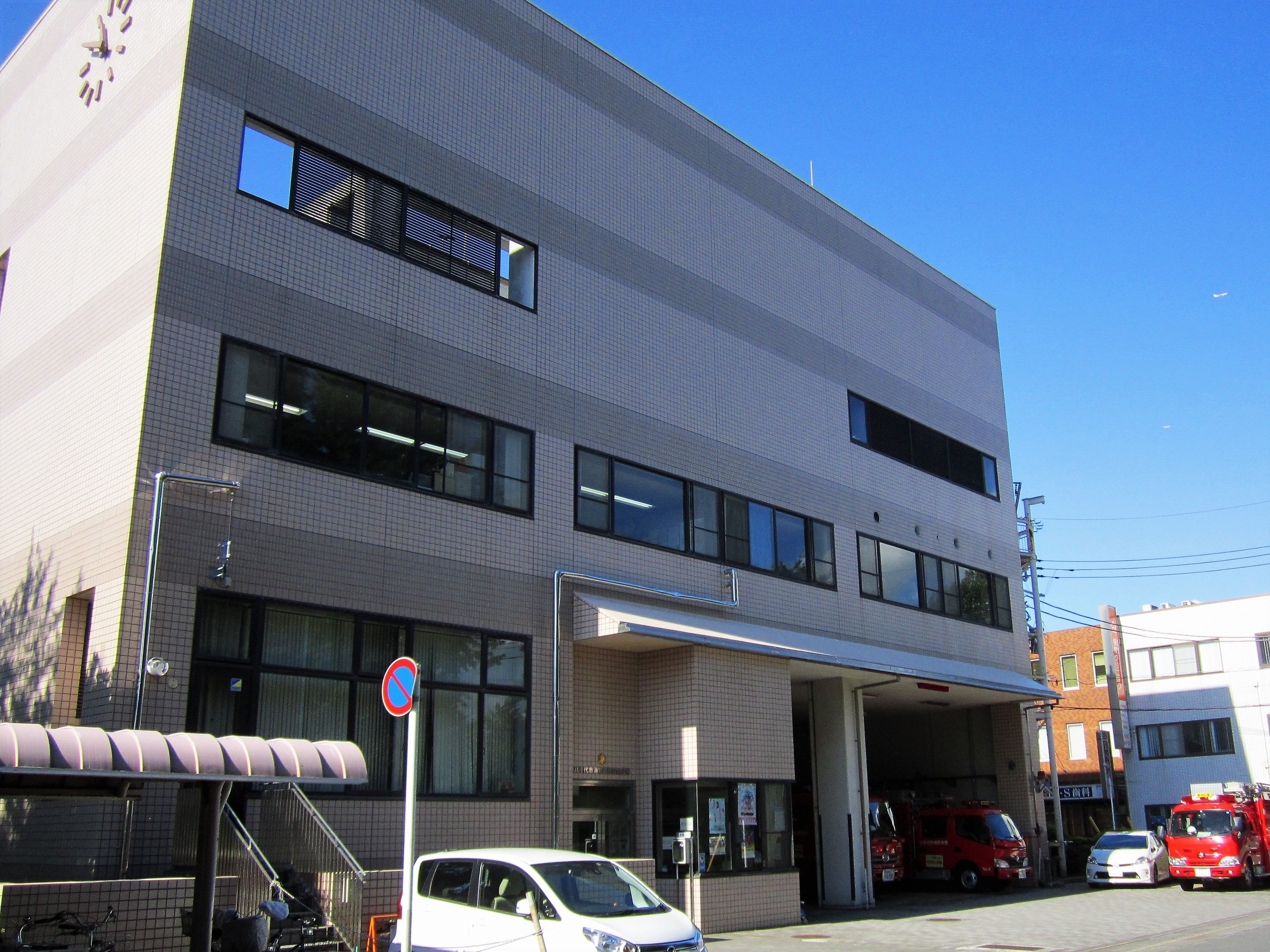 八千代市東消防署勝田台分署（八千代市勝田台）